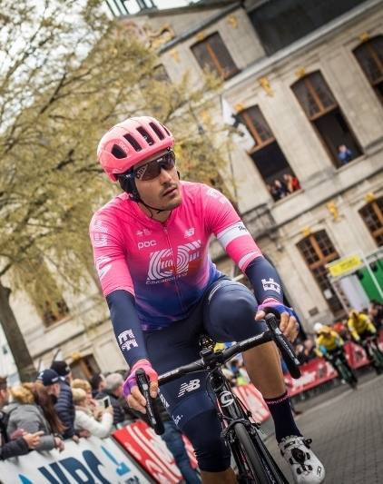 Italiaanse wielrenner Alberto Bettiol van ploeg EF Education First Pro Cycling voor de start van Dwars door Vlaanderen in Roeselare, 3 april 2019 - Foto : Woud Demasure voor KOERS. Museum van de Wielersport